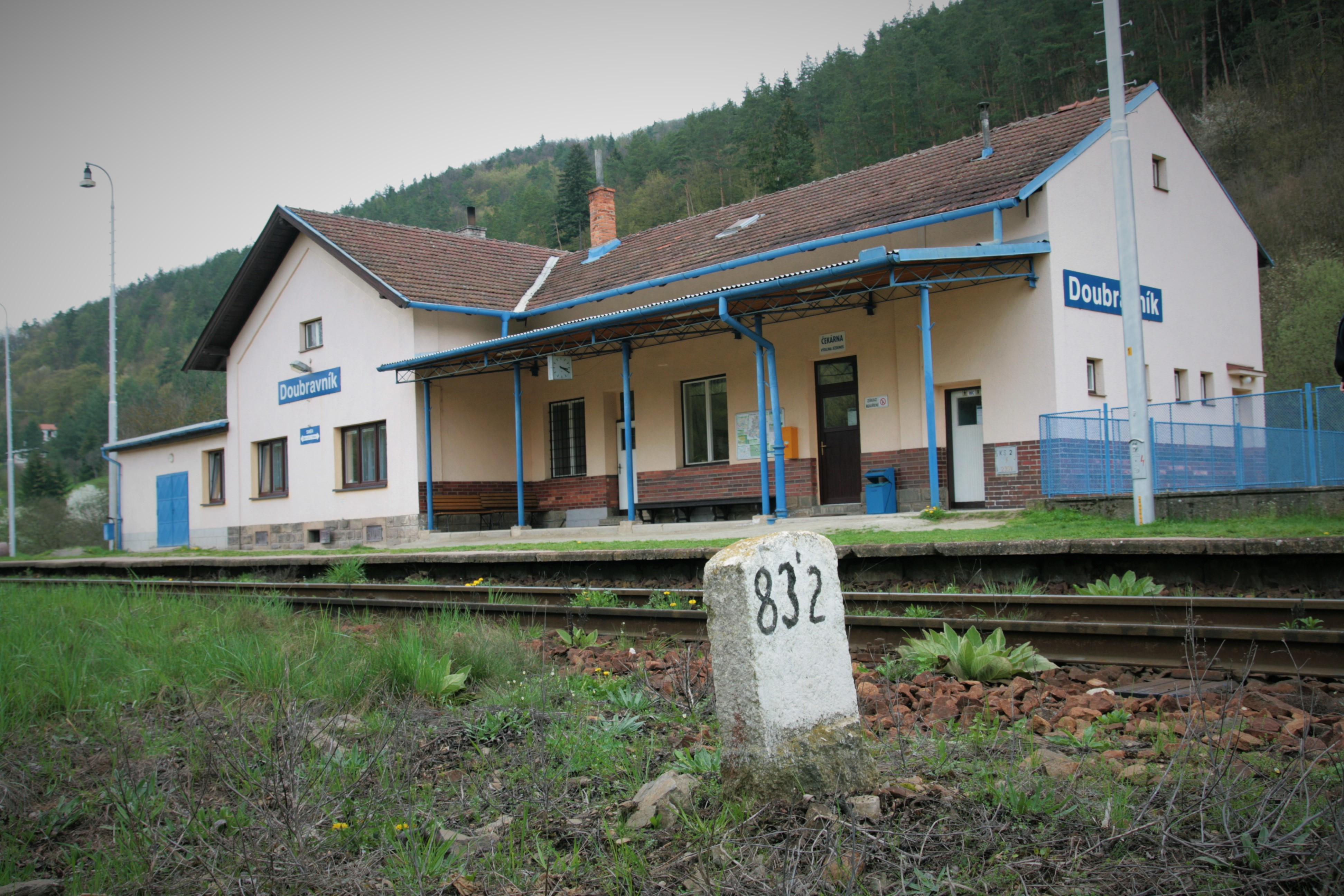 Městys Doubravník, okres Brno-venkov. Železniční stanice, pohled z kolejiště od jihovýchodu.